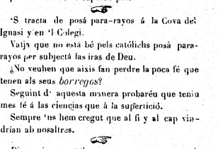 Mostra del laïcisme de Lo Torronyau